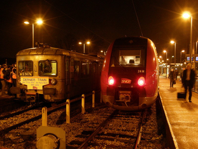 Le Z 6147 après le dernier train assuré par des Z 6100.